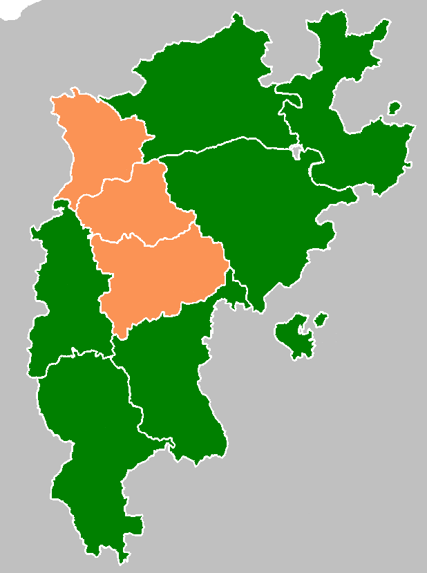 Regierungsbezirke der preußischen Provinz Jülich-Kleve-Berg